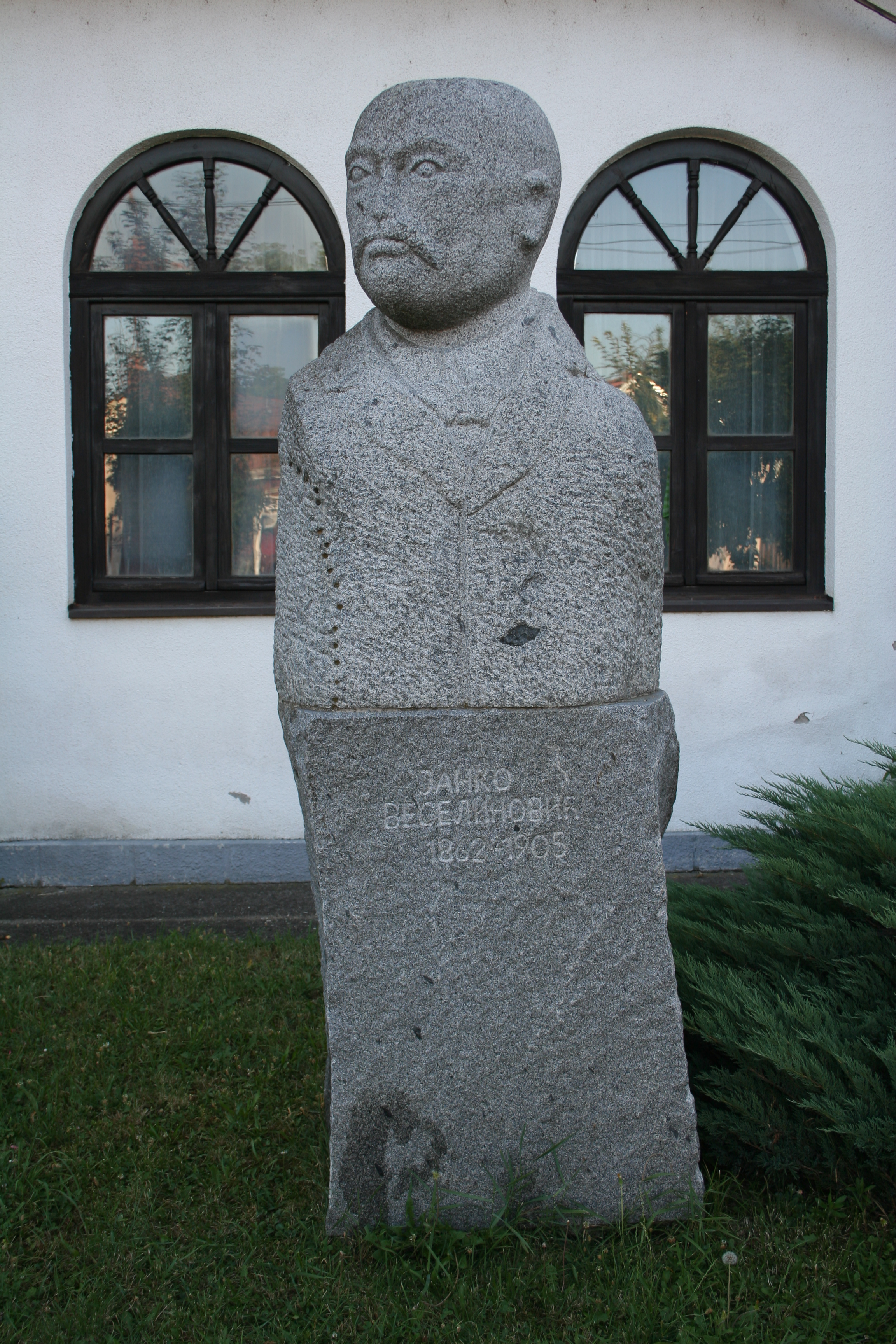 Spomenik Janku Veselinoviću